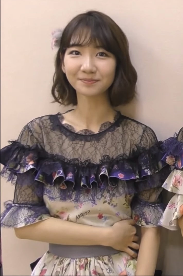 AKB48 Group大前輩 #柏木由紀 #指原莉乃 #峯岸みなみ來將經驗分享給TPE48參賽女孩們，呼籲大家要繼續支持喜歡的女孩喔！